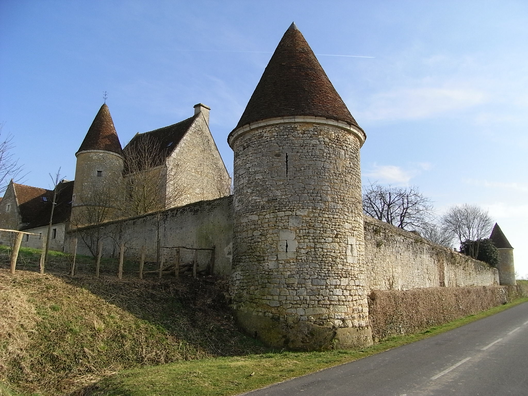 Manoir de la Moussetière (Orne, France) .